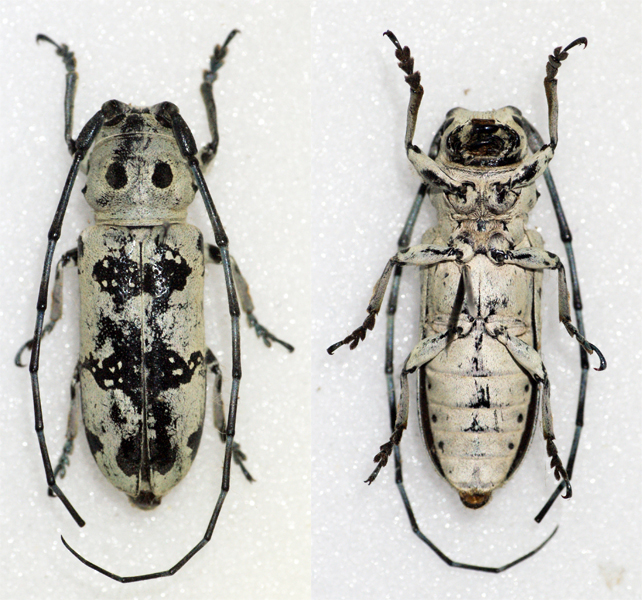 Gerstaecker,1855 Sex: Female Data: 06-2010 - Kafue - Zambia Size: ?